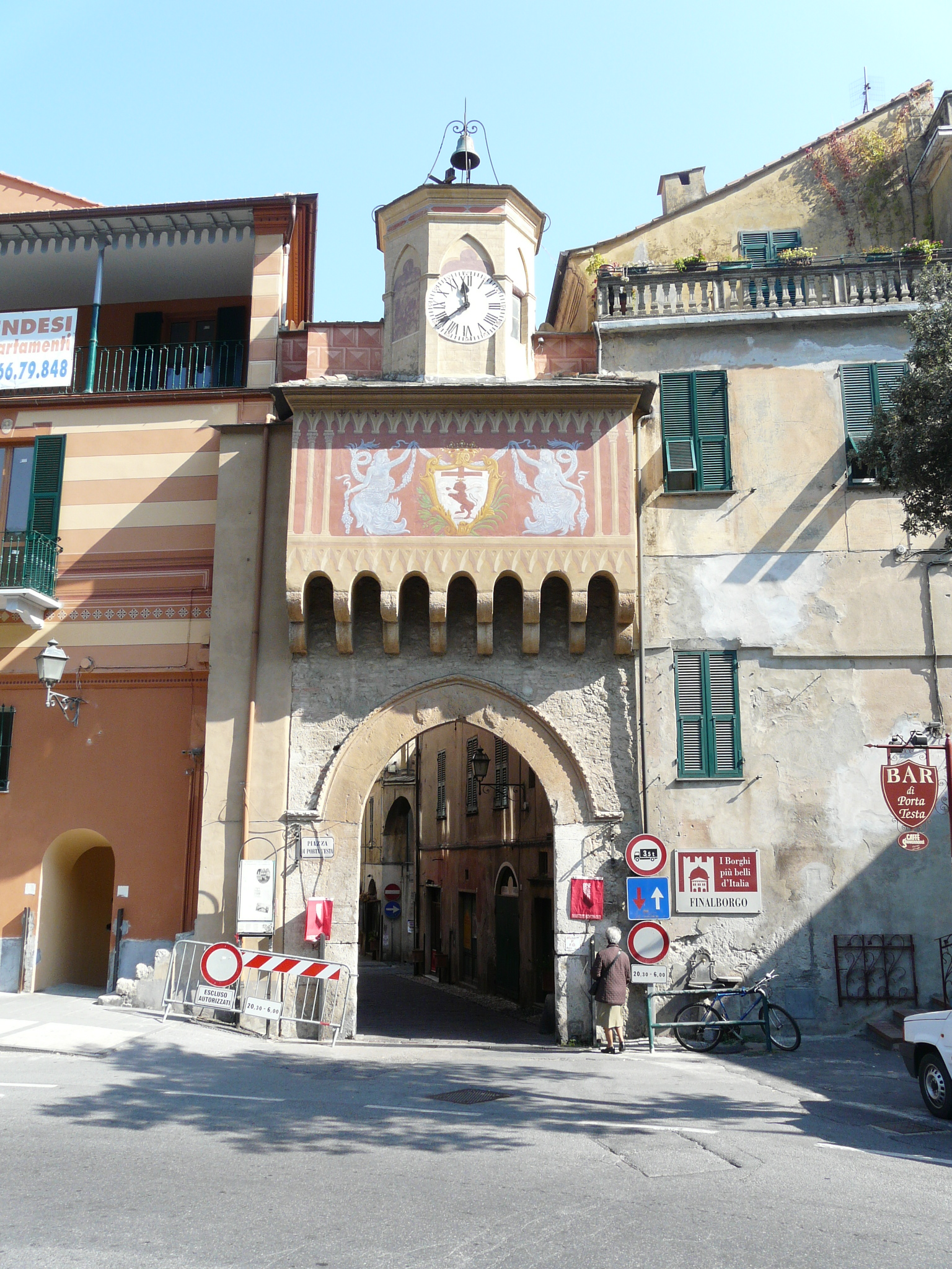 Porta Testa di Via Nicotera, Finalborgo, Finale Ligure, Liguria, Italia